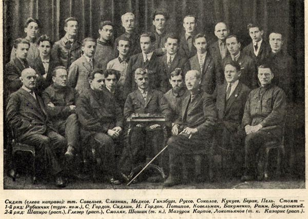 общий снимок участников шашечного чемпионата СССР 1927 года